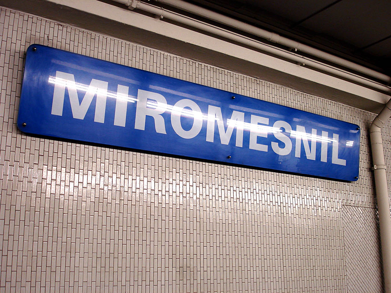 Station Miromesnil de la ligne 9 du métro de Paris, France.